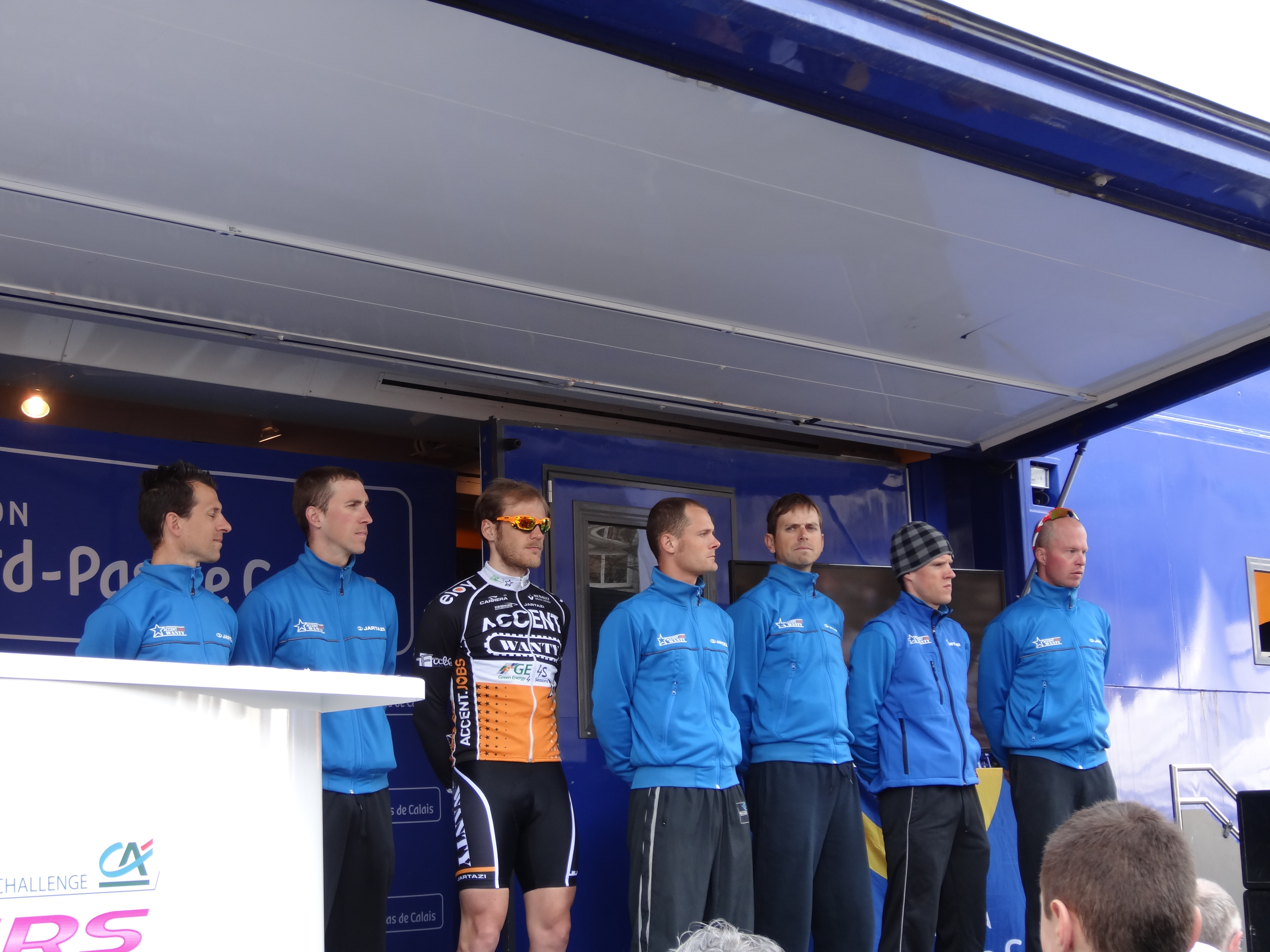 Reportage photographique réalisé le mercredi 1er mai 2013 au départ de la première étape de l'édition 2013 des Quatre jours de Dunkerque à Dunkerque, Nord, Nord-Pas-de-Calais, France. Le dossier photographique montre des véhicules de course exposés, la caravane publicitaire, la présentation des coureurs, et le départ. Depicted people: Nicolas Vogondy, Jempy Drucker, Grégory Habeaux, Steven Caethoven, Jurgen Van Goolen, Thomas Degand and Stefan van Dijk